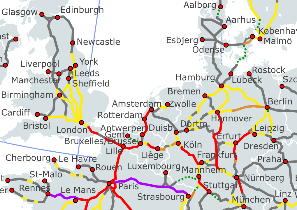 English (en): Regional part around the Netherlands of the high-speed rail (HSR) network of Europe as of June 2020.1 310-320km/h (192-198mph) 270-300km/h (167-186mph) 240-260km/h (149-162mph) 200-230km/h (124-142mph) Under construction/Upgrading (dashed lines) Less than 200km/h (124mph) 1 The map depicts the actual operational high-speed instead of the designed one which may be higher. Nederlands (nl): Regionaal deel om Nederland heen van het Europese hogesnelheidslijnnetwerk per juni 2020.1 310-320 km/u 270-300 km/u 240-260 km/u 200-230 km/u In aanbouw (stippellijnen) Minder dan 200 km/u 1 De kaart geeft de feitelijke operationele snelheid aan in plaats van de ontworpen snelheid, die soms hoger ligt.